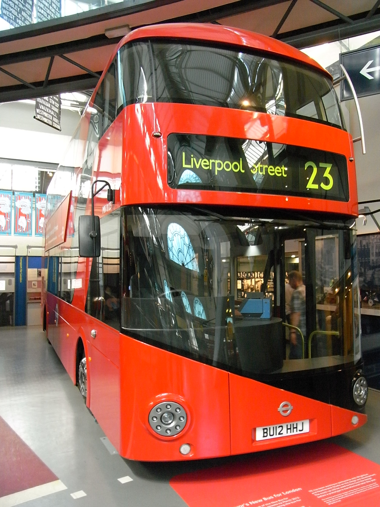 Ein Prototyp des new Routemasters im London Transport Museum